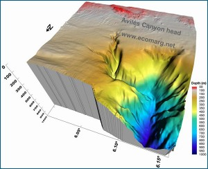 Infografía sobre el Cañón de Avilés.